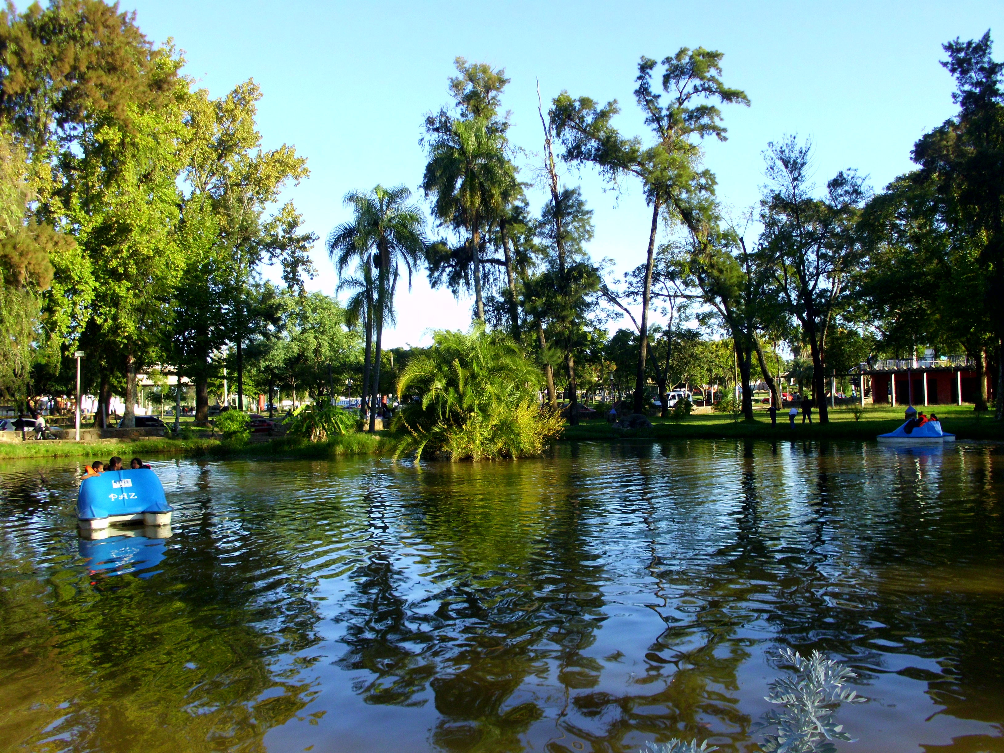 Parque Rodo Artigas Lago